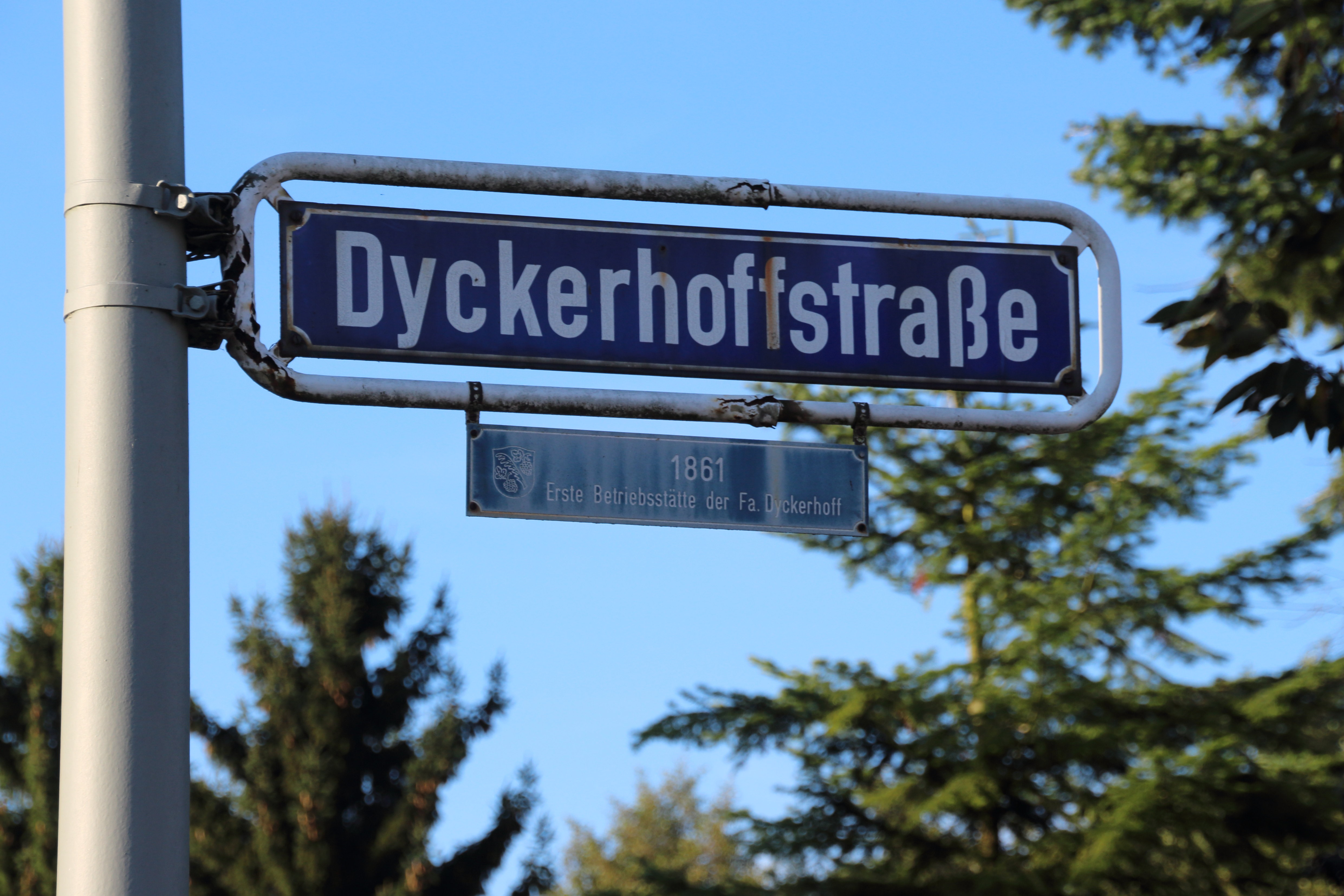 Dyckerhoffstraße in Hattenheim im Rheingau. 1861 erste Betriebsstätte des Zementwerks "Dyckerhoff & Brentano".